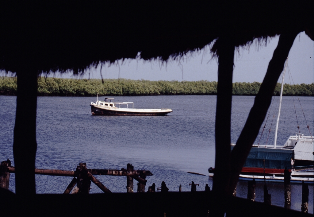 Blick auf den Gambia River beim Tendaba Camp